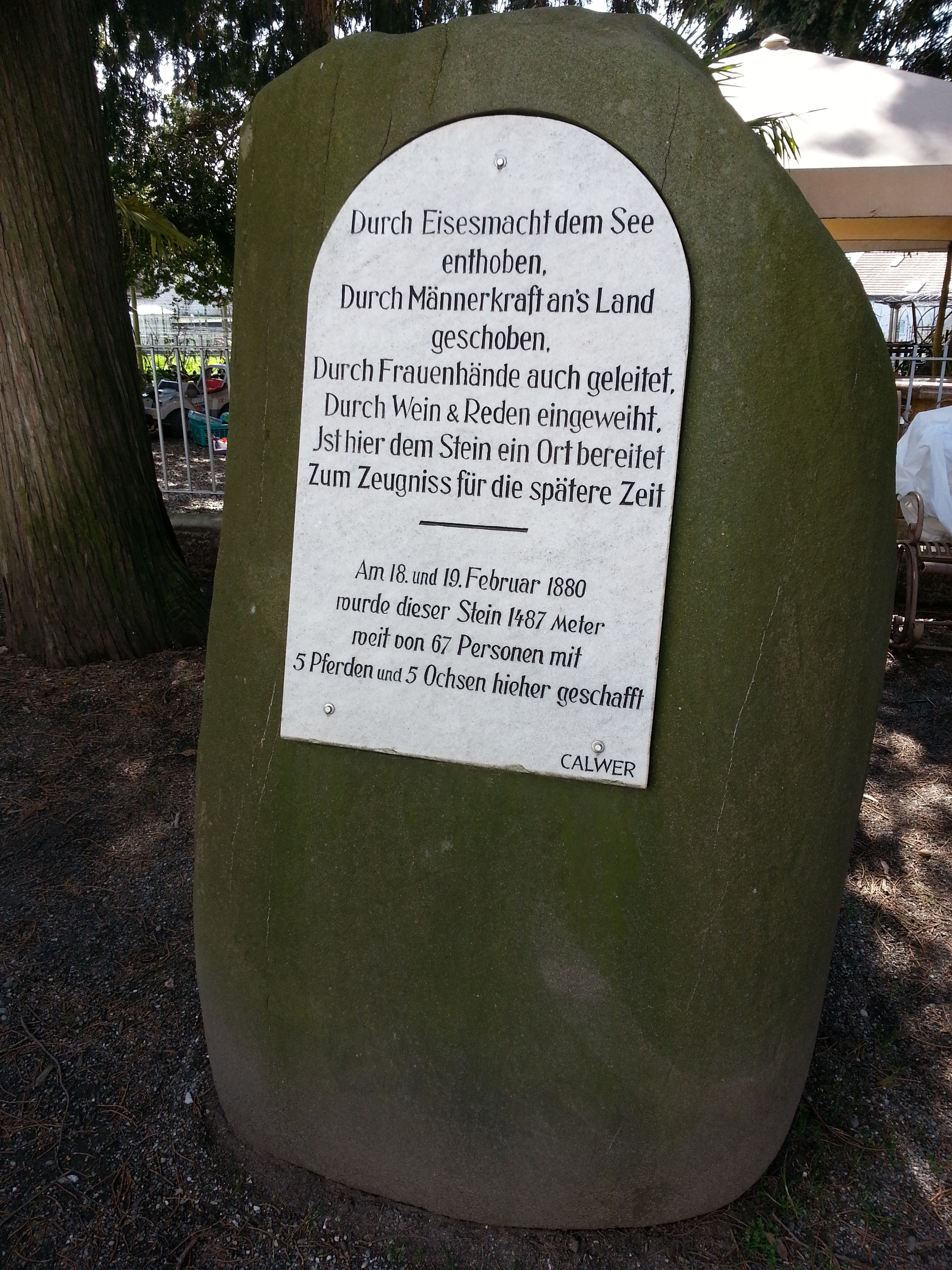 Deutschland - Bayern - Landkreis Lindau - Nonnenhorn: Gedenkstein an die Seegfrörne im Winter 1879/1880 auf dem Kapellenplatz